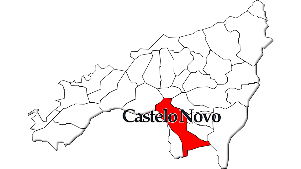 População